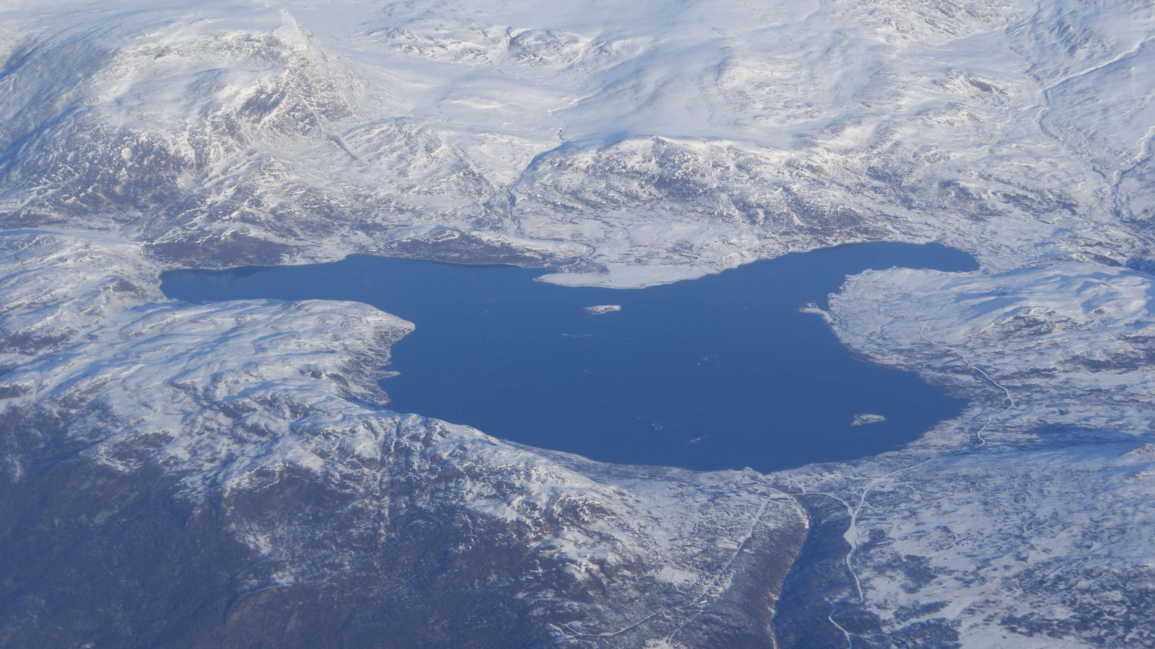 Vavatn, Buskerud, Norway. Aerial shot from Bombardier Dash-8 during Widerøe flight Oslo-Førde